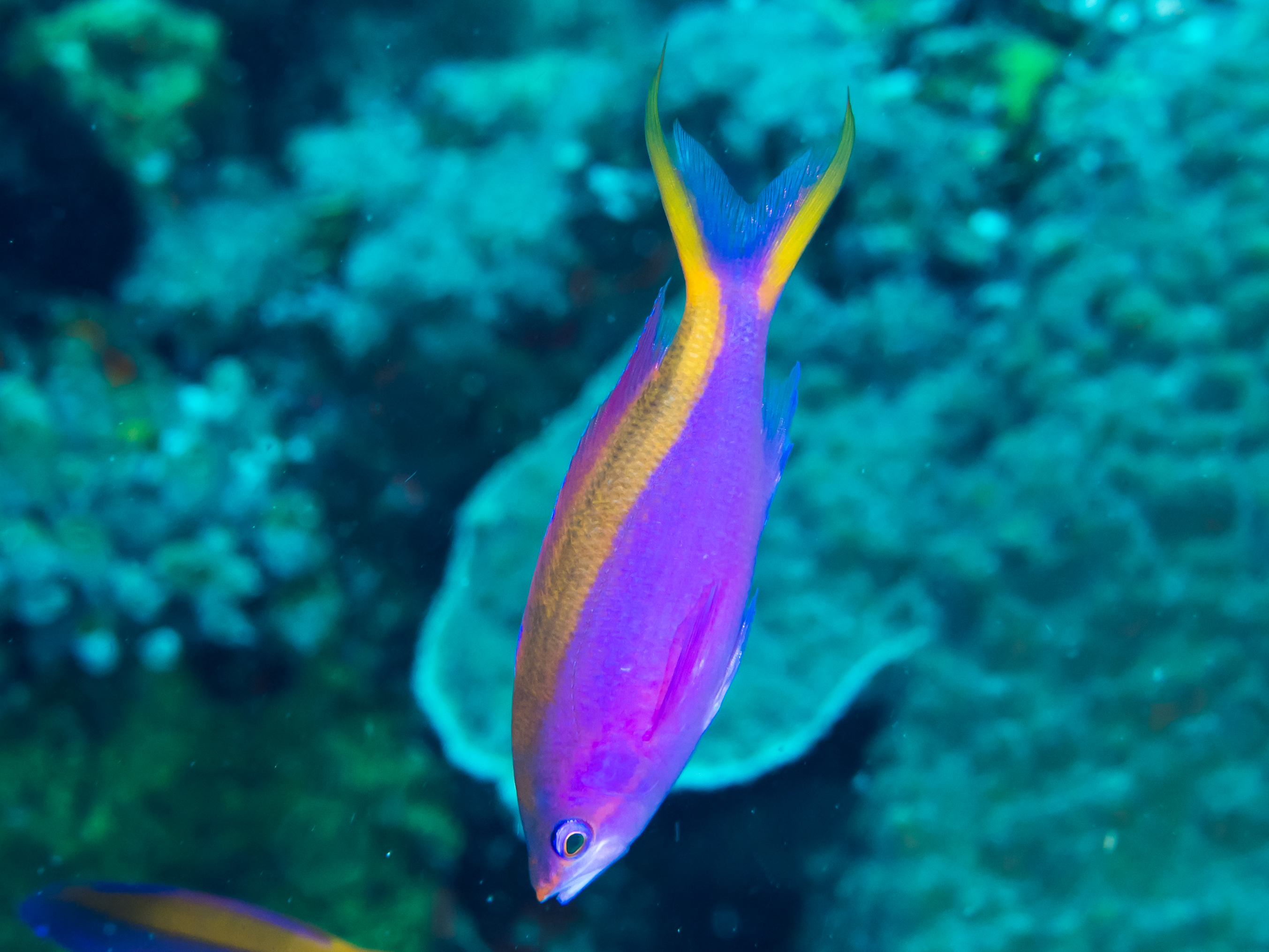 Lembeh, Indonesia - Purple anthias (Pseudanthias tuka)